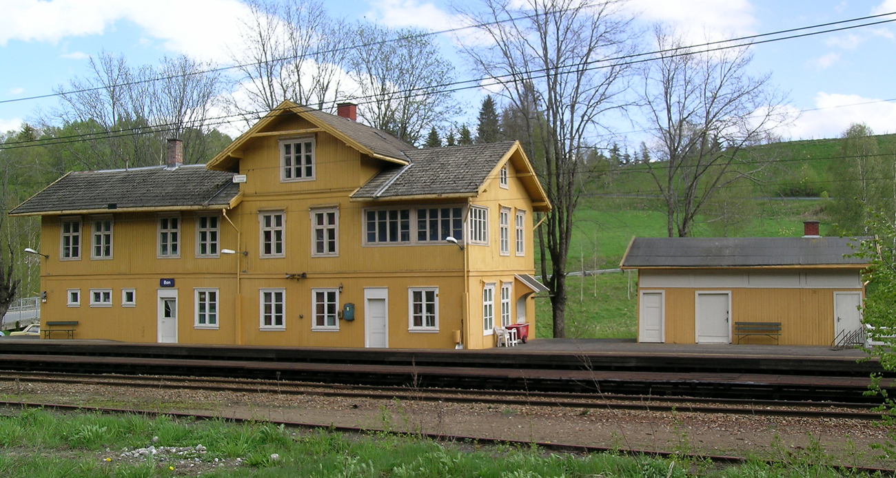 Bøn stasjon, Hovedbanen. Mulig byggeår 1858.